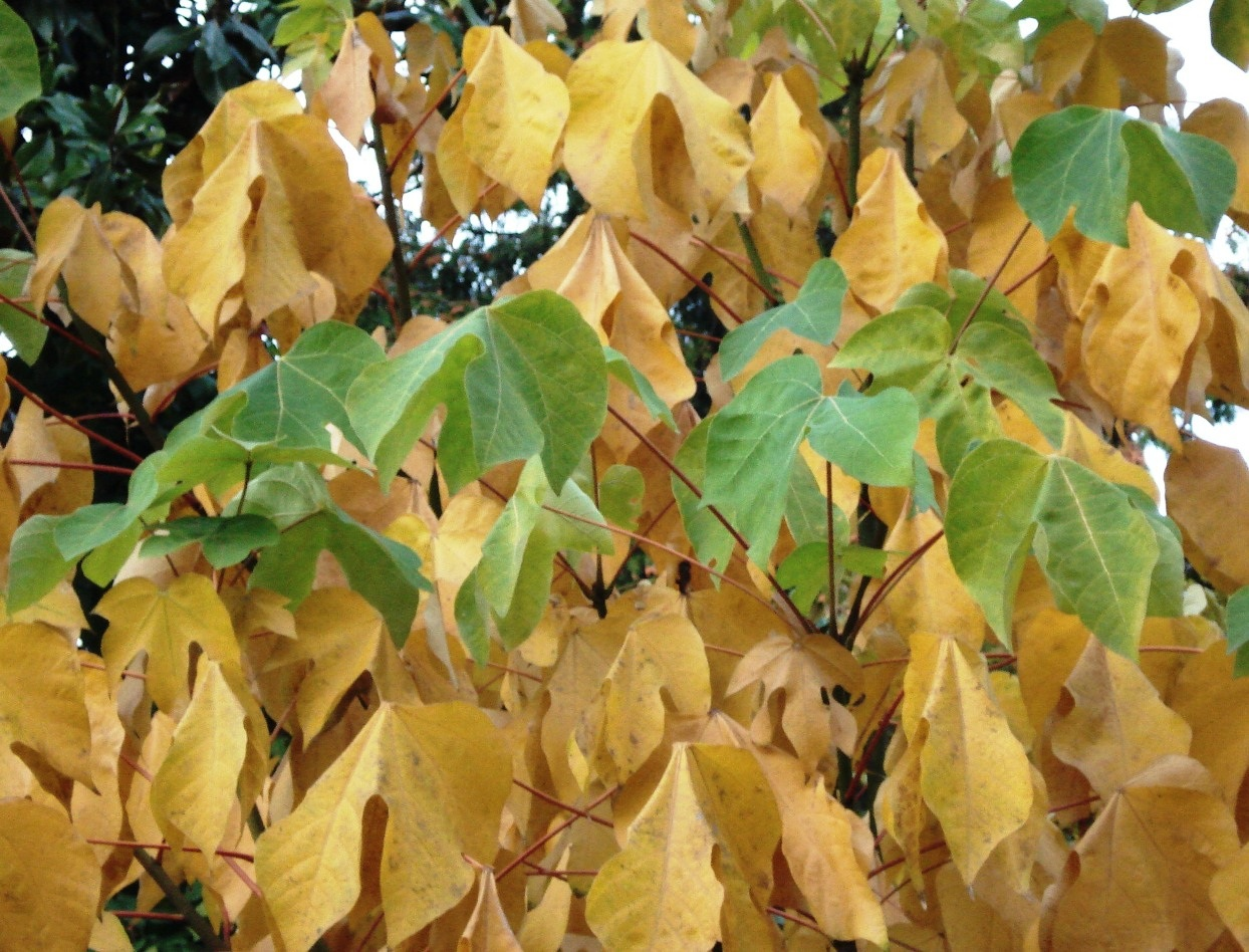 Firmiana simplex - leaves